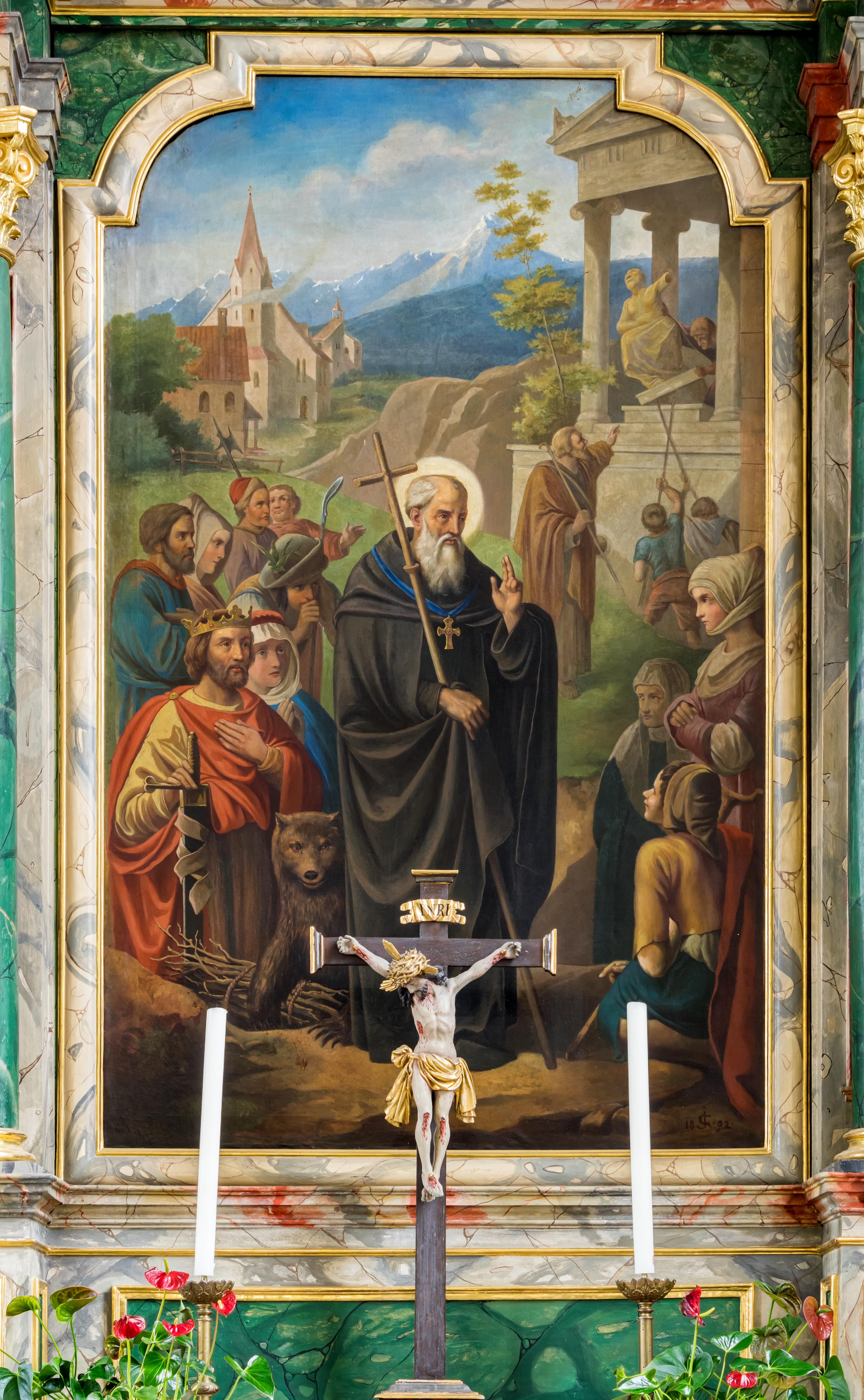 Bilder aus Gottenheim. Die katholische Kirche St Stephan. Bilder aus dem Inneren der Kirche Der rechte Seitenaltar Das Hauptbild Der heilige Gallus predigt am Bodensee, Johannes Cahn (1892)